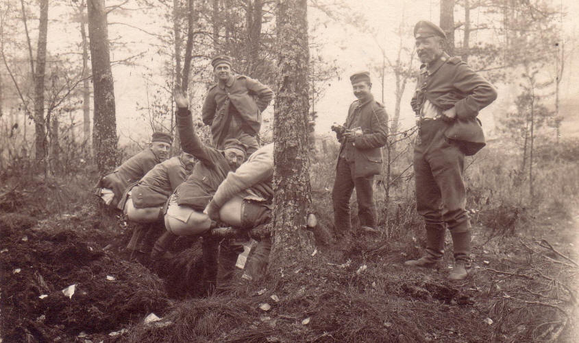 Die Fliegerabteilung 24 in Bielawina Ende 1917 Der Abteilungs-Donnerbalken.